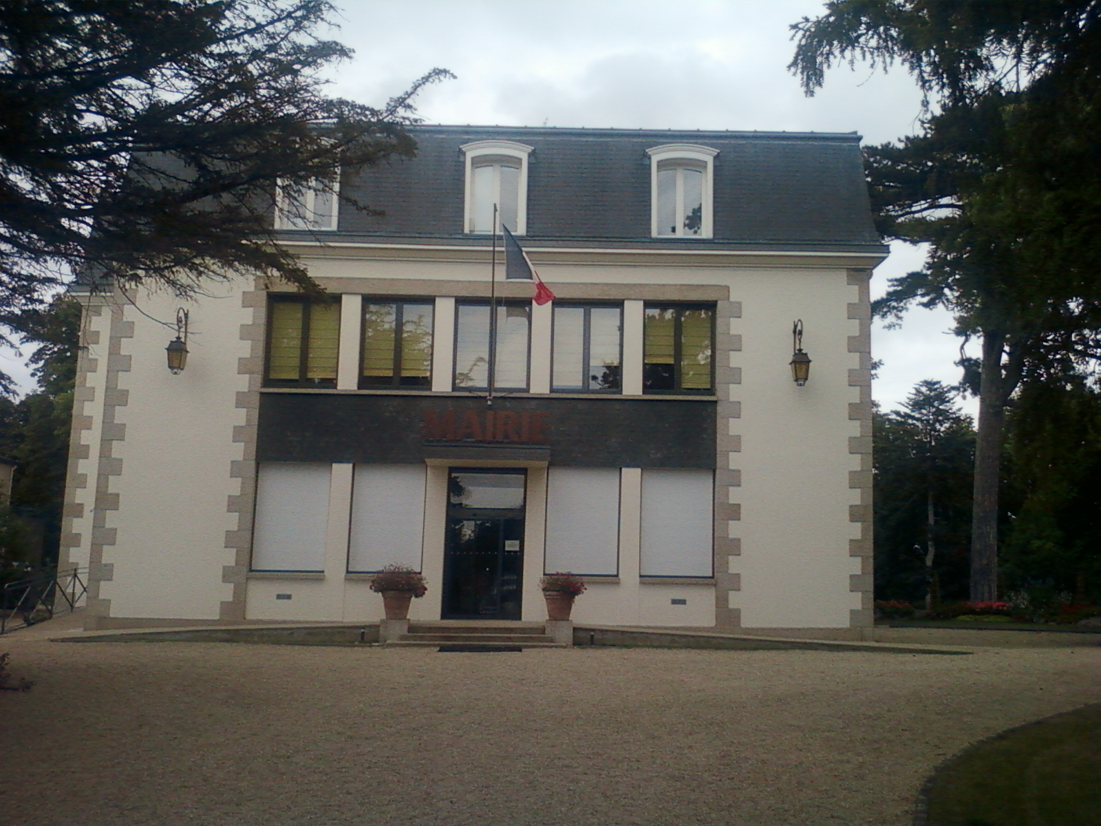 TI -KÊR PLOUVALAE